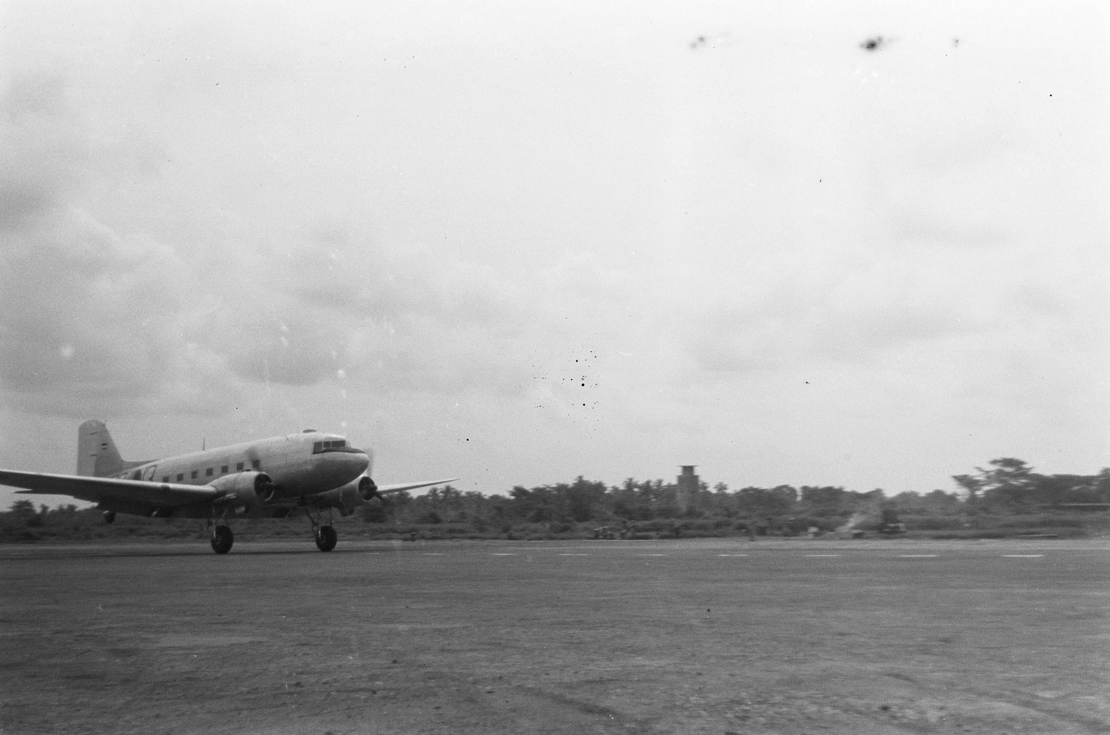 Collectie / Archief : Fotocollectie Dienst voor Legercontacten Indonesië Reportage / Serie : [DLC] Vliegveld Maospati Madioen Beschrijving : Een militair vliegtuig (een Dakota) landt Datum : 19 april 1949 Locatie : Indonesië, Nederlands-Indië Fotograaf : Kellenbach, F.C. / DLC Auteursrechthebbende : Nationaal Archief Materiaalsoort : Negatief (zwart/wit) Nummer archiefinventaris : bekijk toegang 2.24.04.02 Bestanddeelnummer : 377